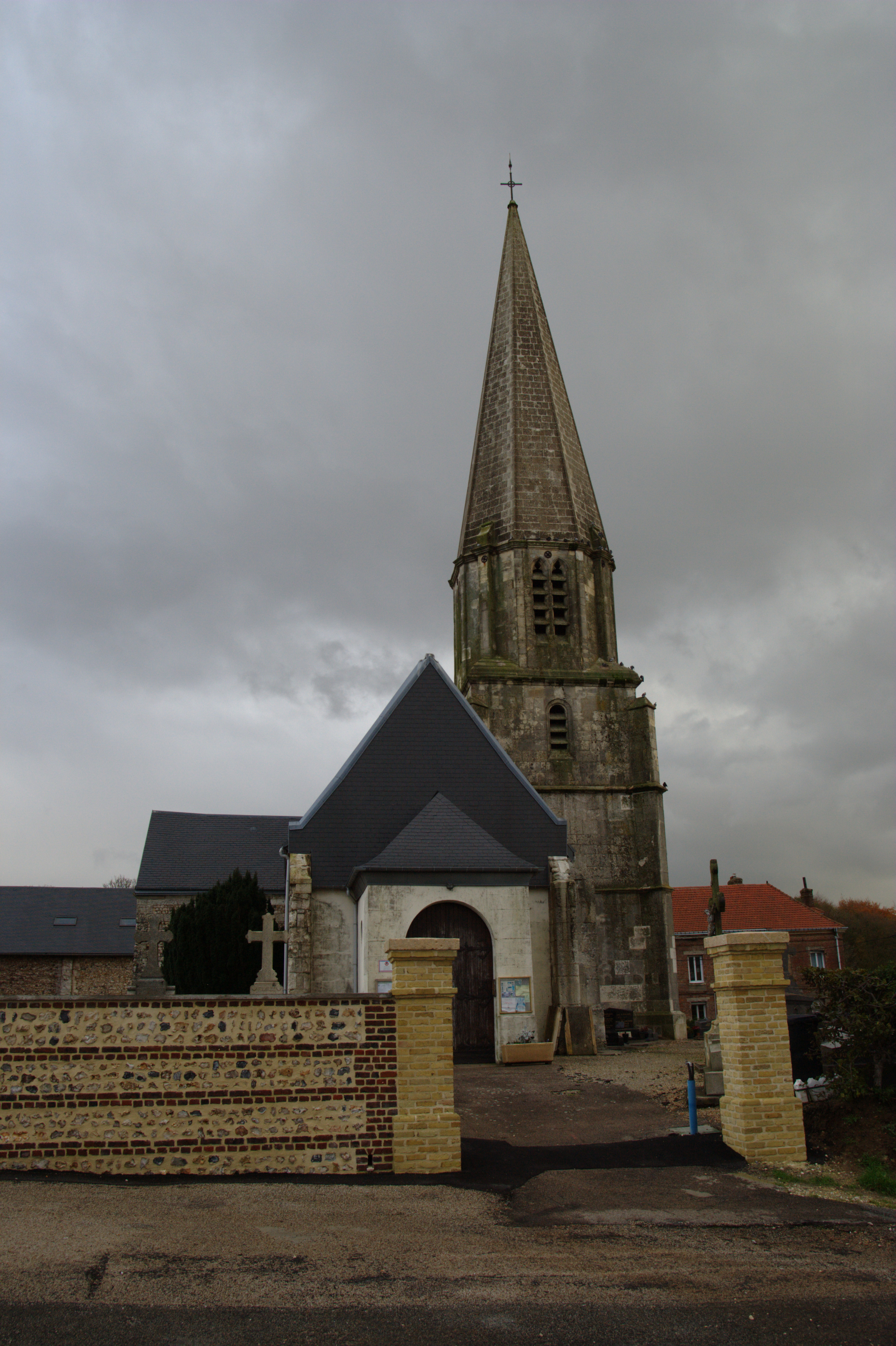 Église de Gainneville.